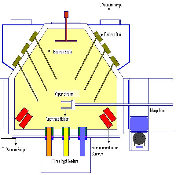 Arun Ram Mohan. I did it myself.